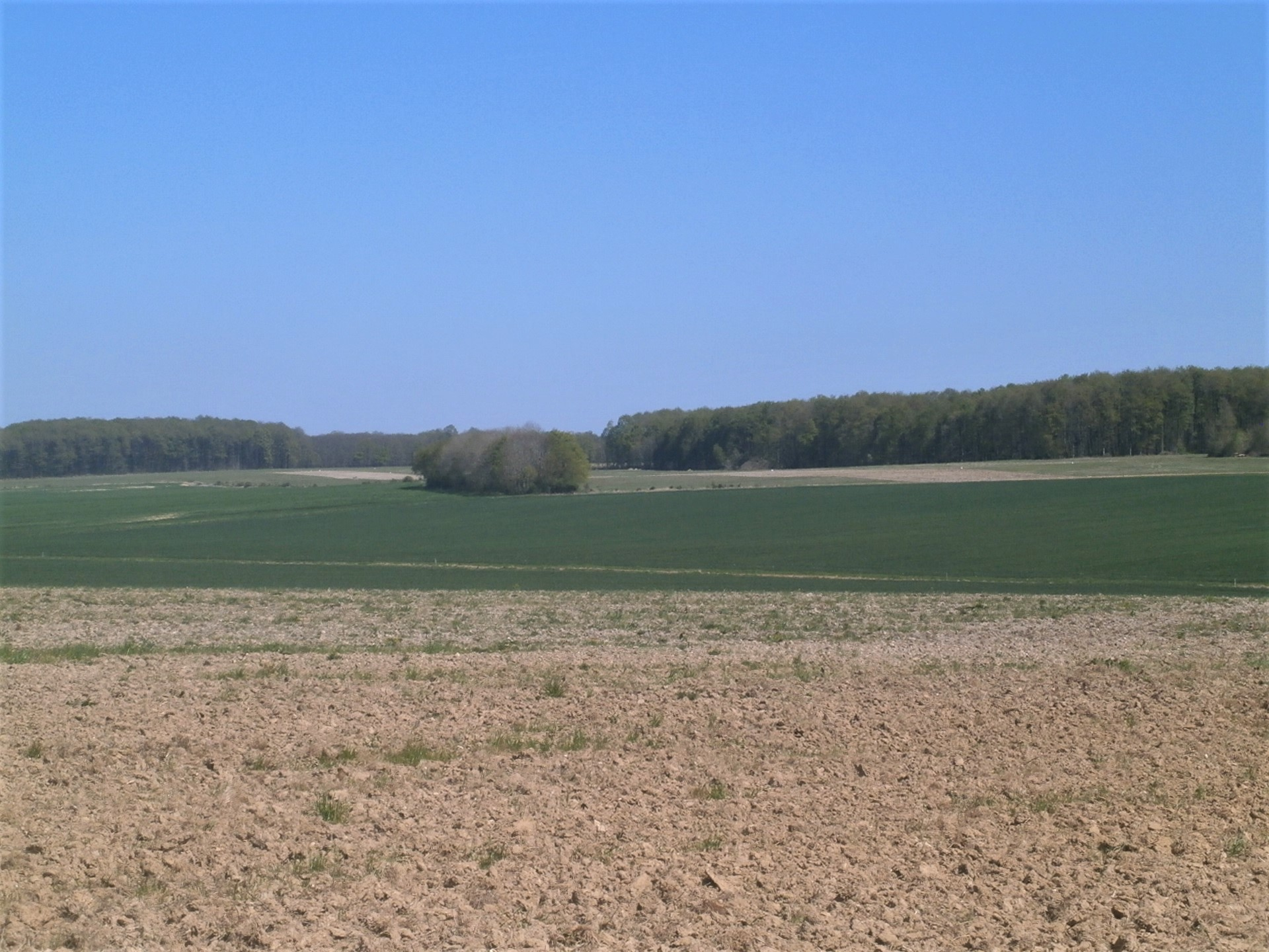 Paysage de champs ouverts à Orbigny. Forêt de Brouard en arrière-plan.